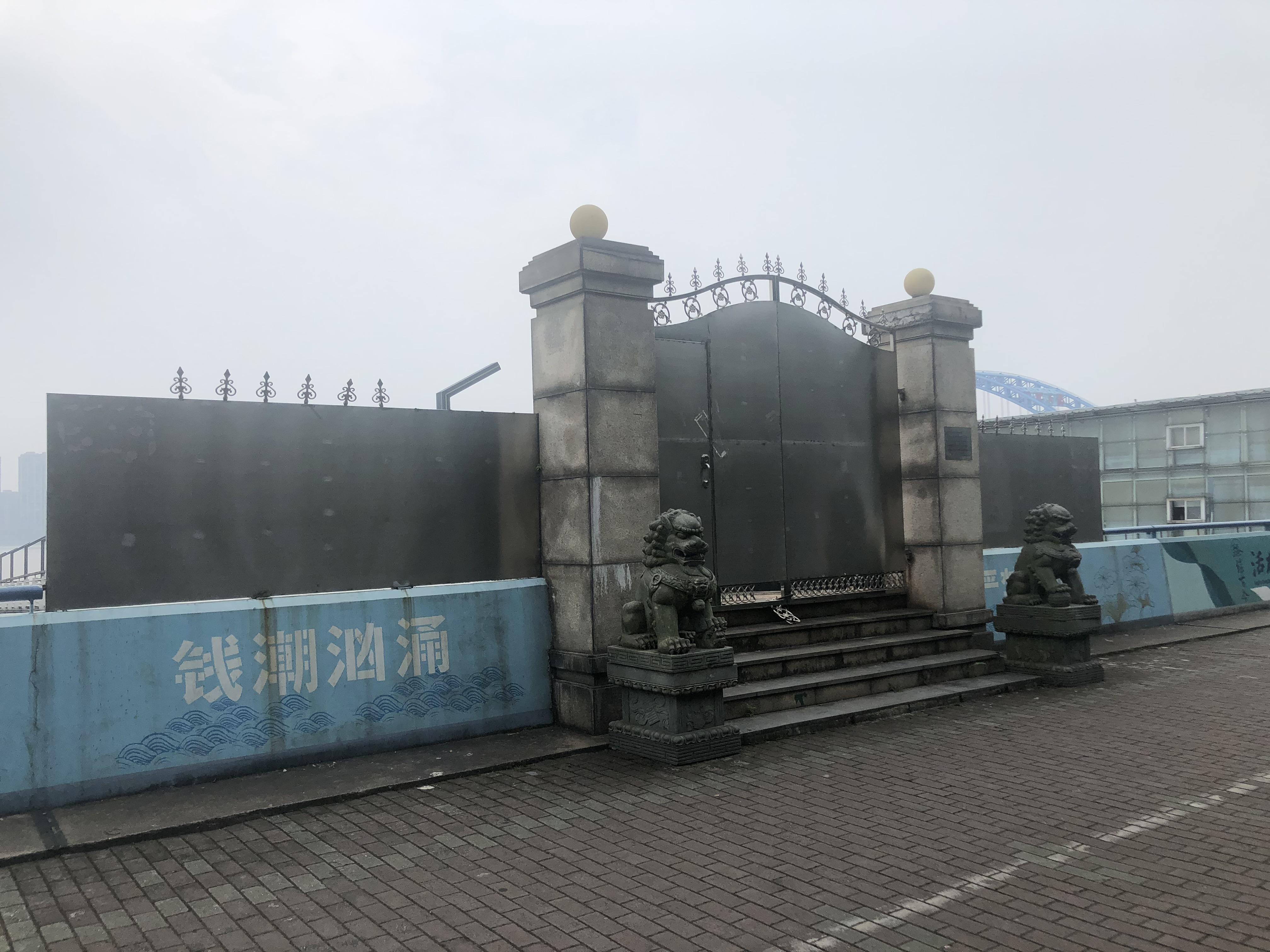 浙江第一码头正门